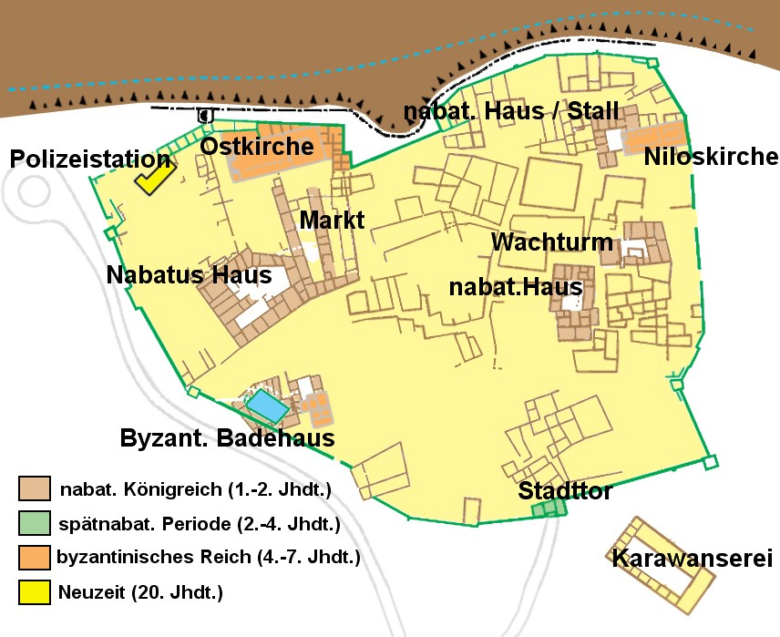 Karte des archäologischen Geländes von Mamshit